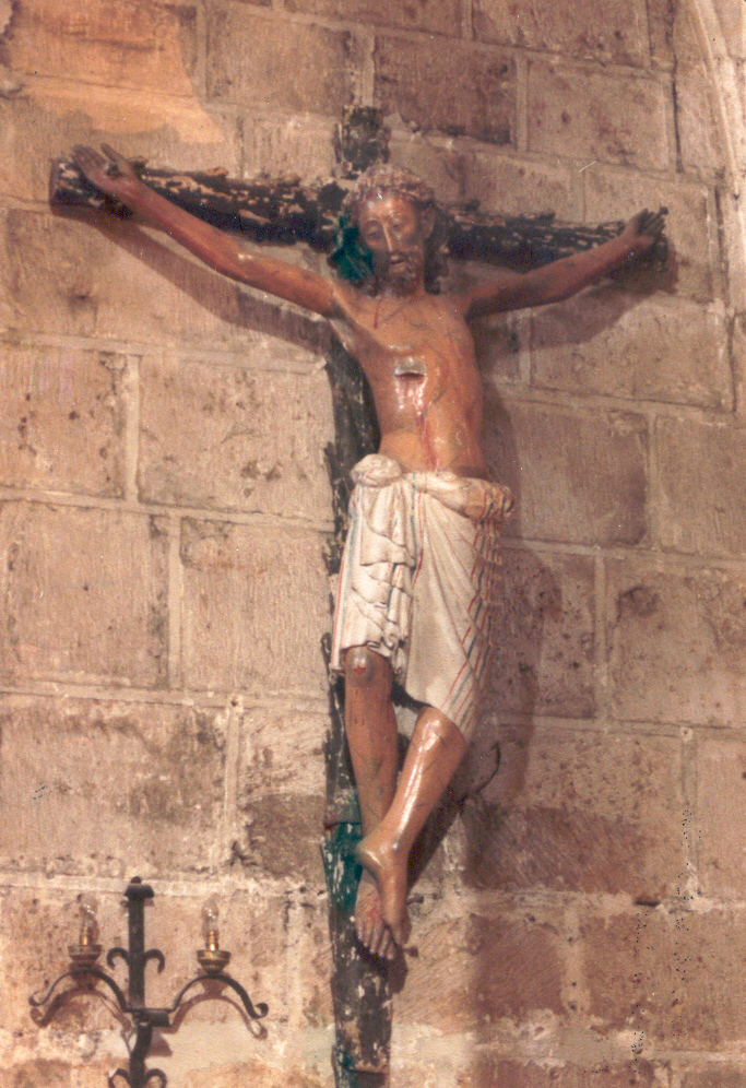 Imagen del Cristo de Reveche en el Museo Gomellano, Gumiel de Izán, Burgos